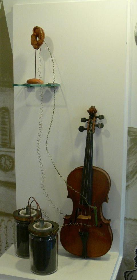 Das Bild zeigt den ersten Telefonapparat entwickelt von Philipp Reis